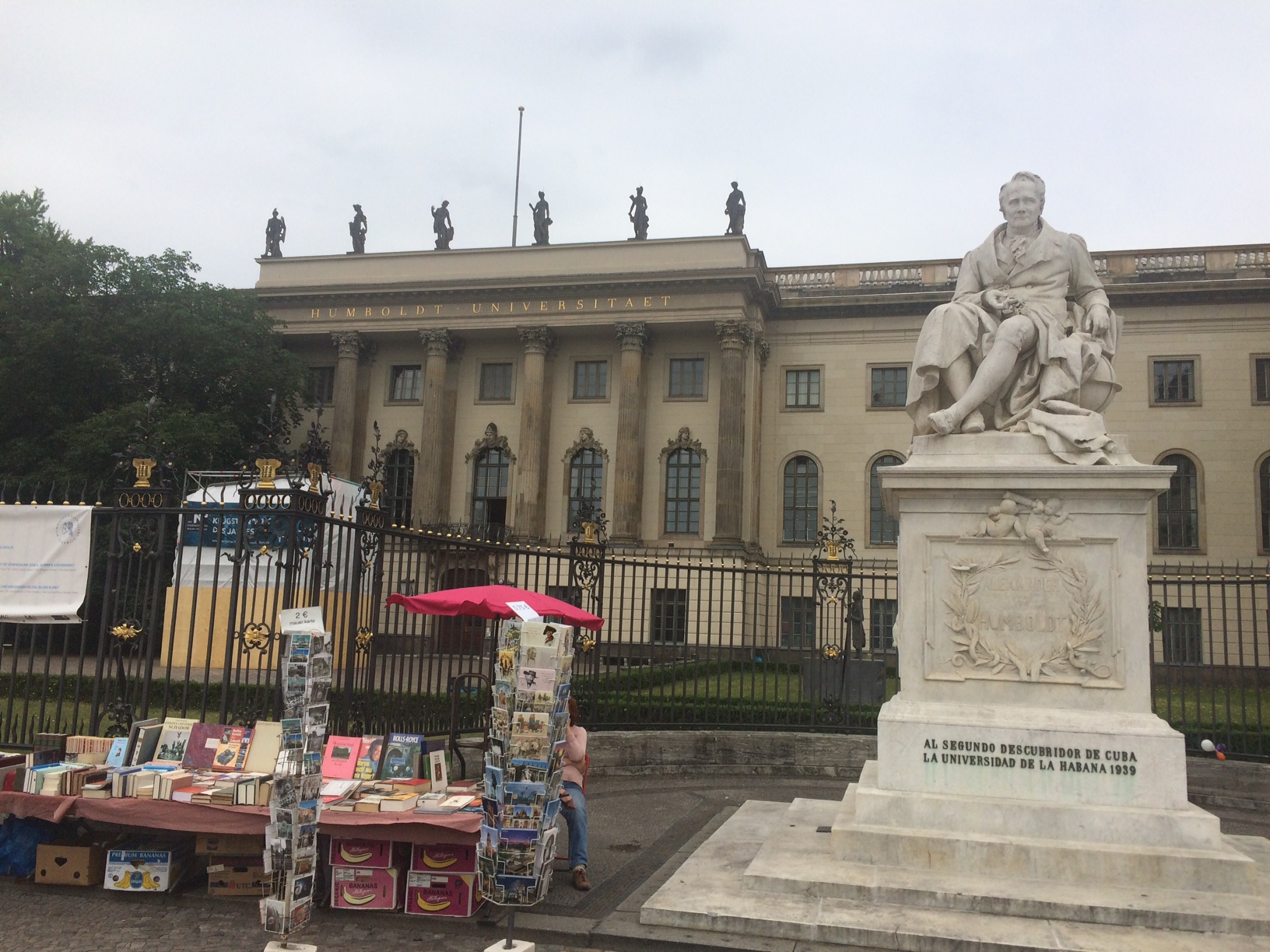 Статуя Гумбольдта перед берлинским университетом